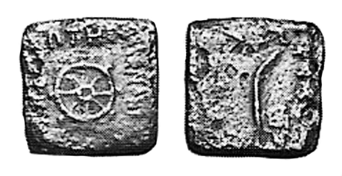 Монета короля Менандра